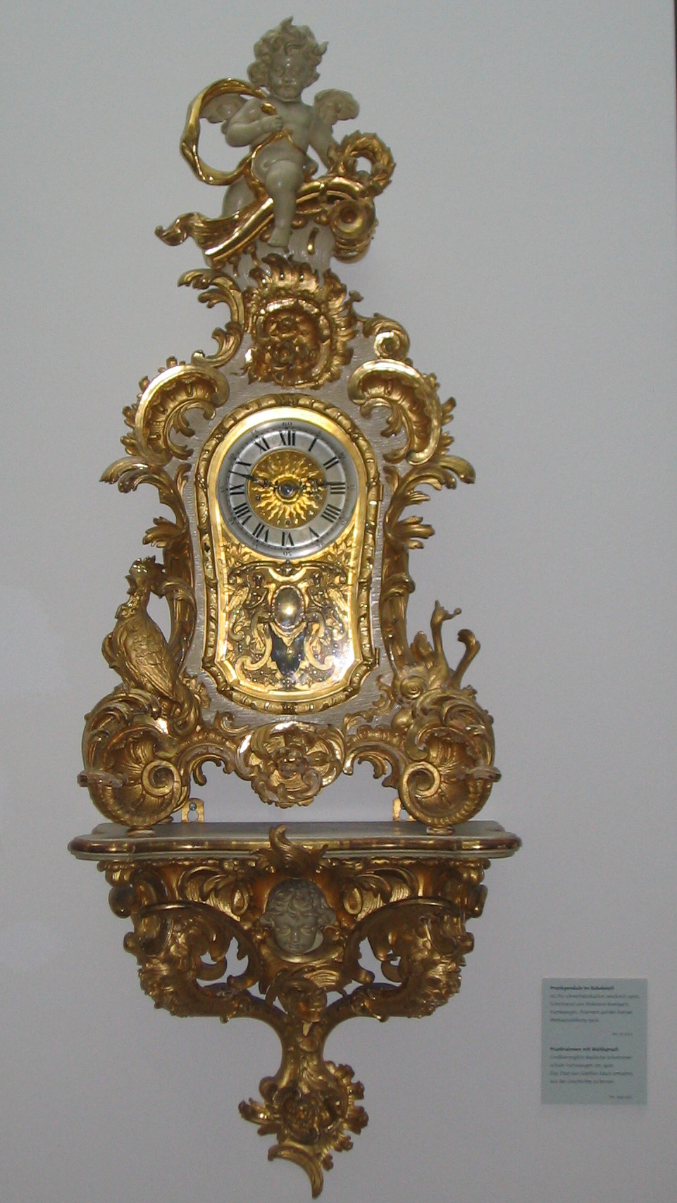 Prunkpendule im Rokokostil der AG für Uhrenfabrikation Lenzkirch 1900, Schnitzerei von Philemon Rombach aus Furtwangen, prämiert auf der Pariser Weltausstellung 1900